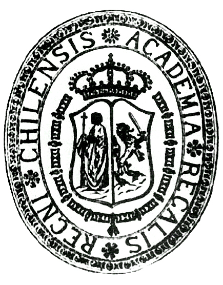 La Real Universidad de San Felipe fue la primera universidad del estado, creada durante la pertenencia del actual territorio chileno a la Monarquía Hispánica por el Rey de España en 1738, fundada en Santiago de Chile en 1747 e iniciadas sus actividades docentes en 1758. Es la inmediata antecesora de la Universidad de Chile.